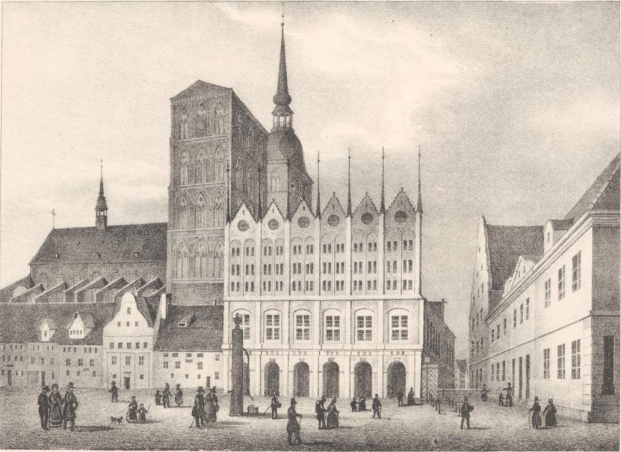 Das Rathaus zu Stralsund, Lithographie : 17 x 12 cm, Heinrich Wilhelm Teichgräber